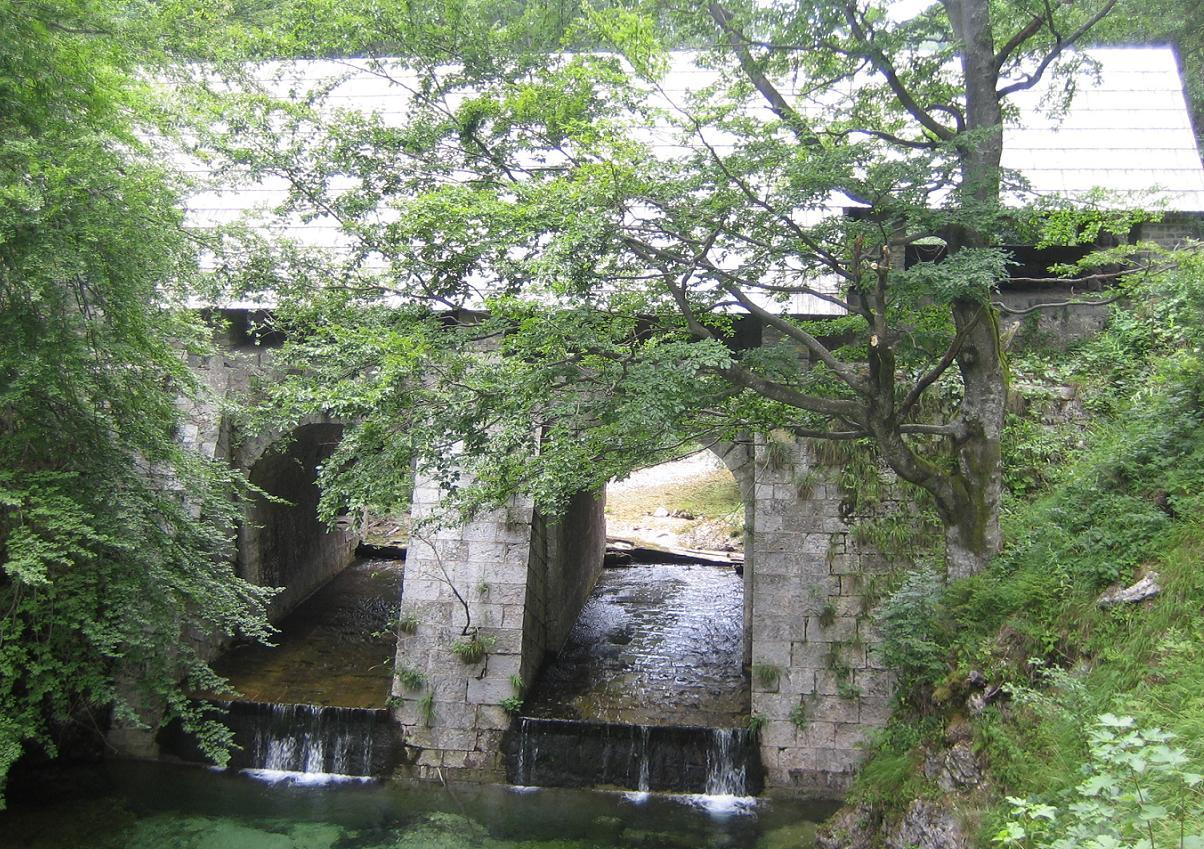 Klavže (dam) on river Idrijca near Idrija, Slovenija photo:Ziga 18:11, 11 August 2006 (UTC)